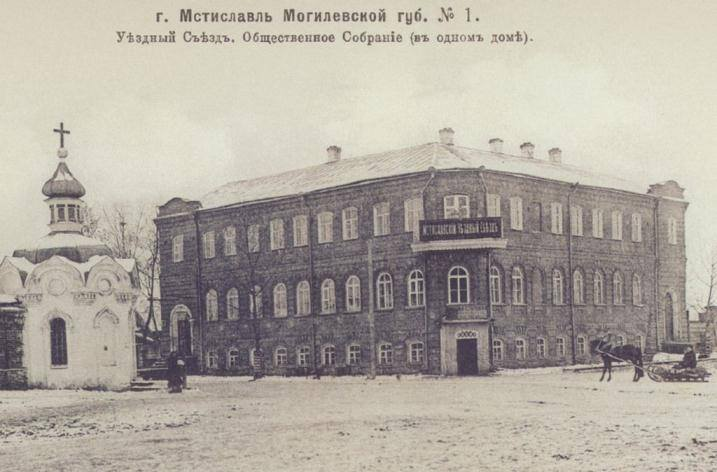 Беларуская (тарашкевіца): Амсьціслаў (Amścisłaŭ), вуліца Смаленская (vulica Smalenskaja)